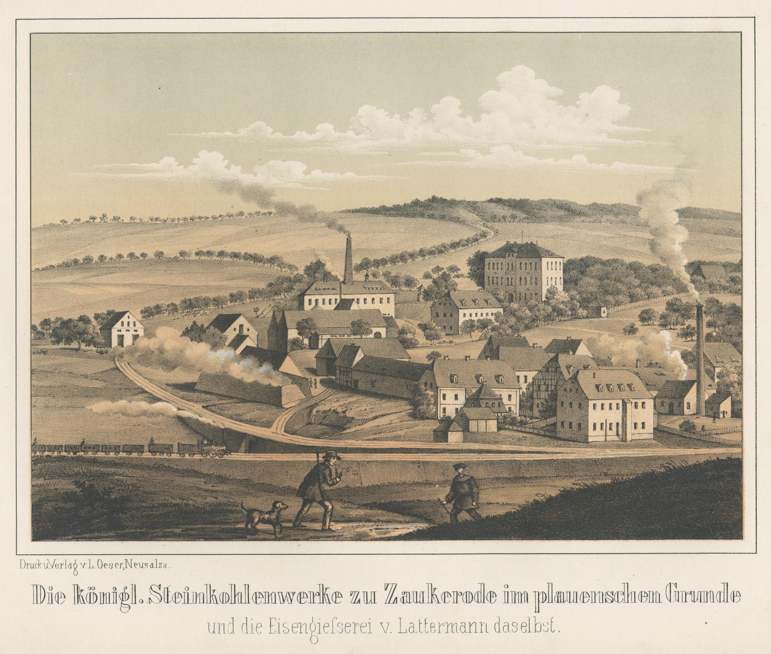 Die königl. Steinkohlenwerke zu Zaukerode im plauenschen Grunde und die Eisengiesserei von Lattermann daselbst aus: Album der Sächsischen Industrie Erster Band